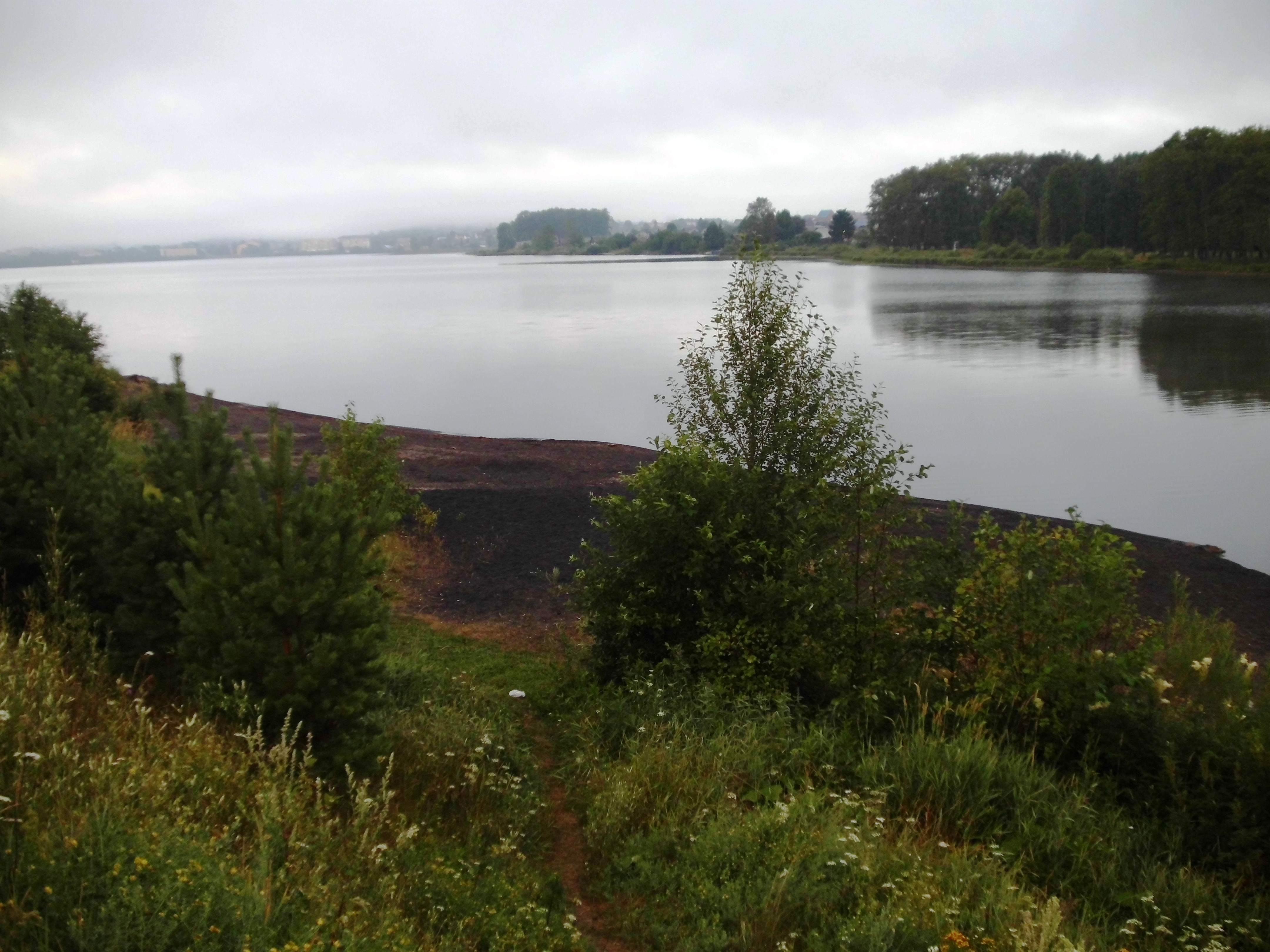 Верхнеуфалейский пруд в городе Верхний Уфалей на реке Уфалейка. Вид с юго-восточного берега. Участок берега из частиц смытого шахтно-печного шлака комбината "Уфалейникель" использованного для отсыпки железнодорожной насыпи на станции Верхний Уфалей".